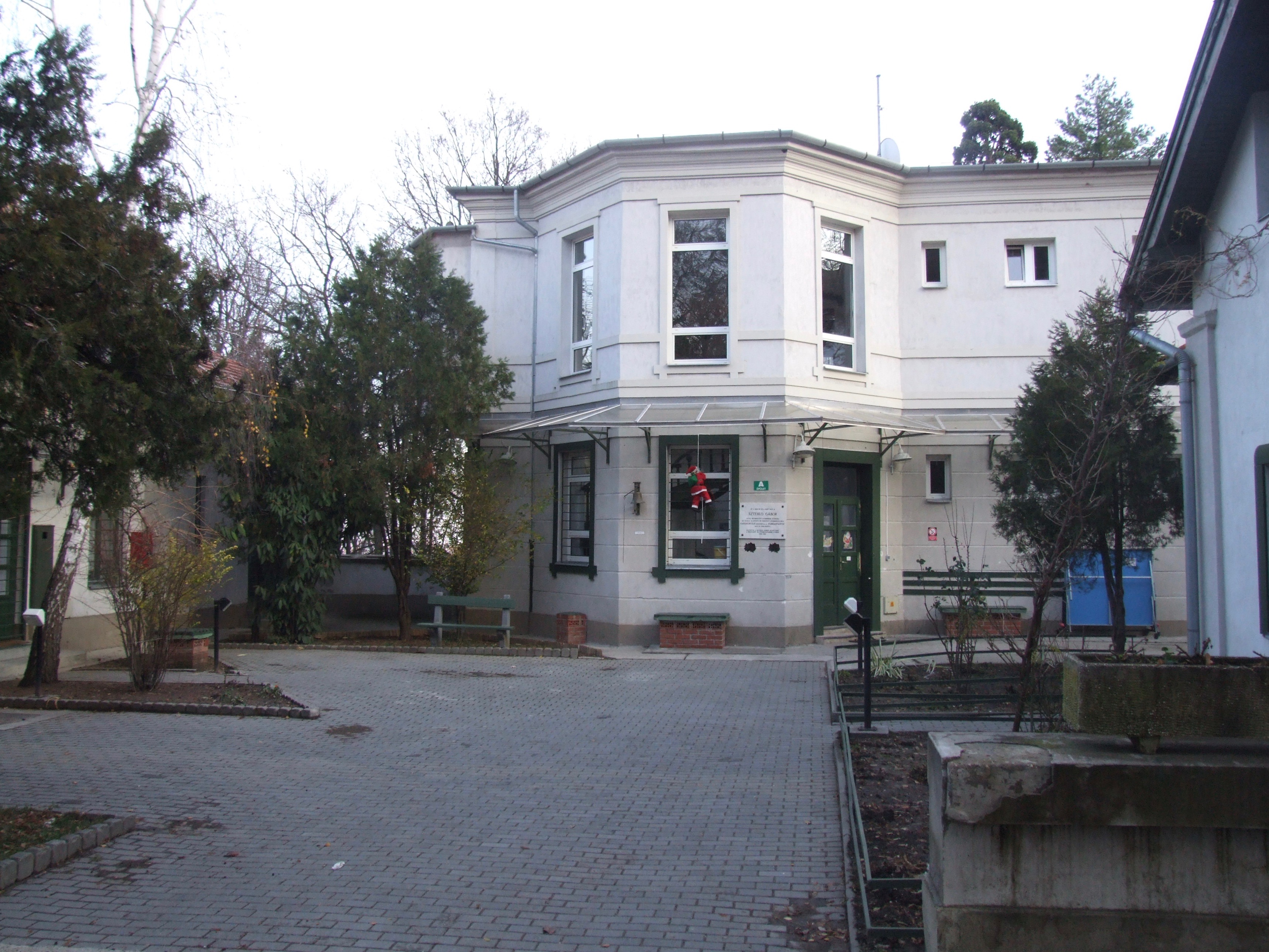 Gaudiopolis: A központi épület.- Vasvári Pál Gyermekotthon működik a területen. XII. Budakeszi út 48